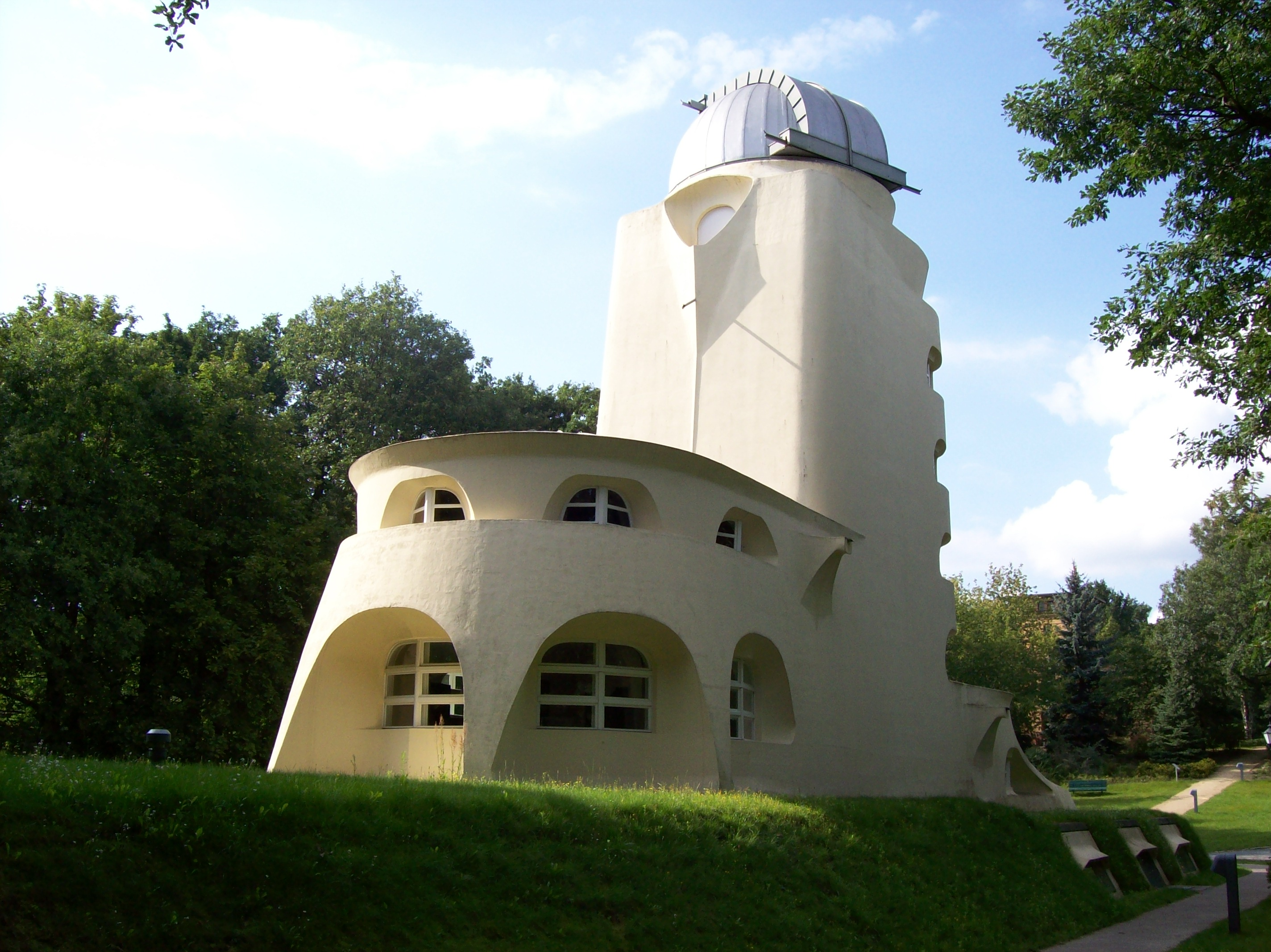 Einsteinturm, Potsdam